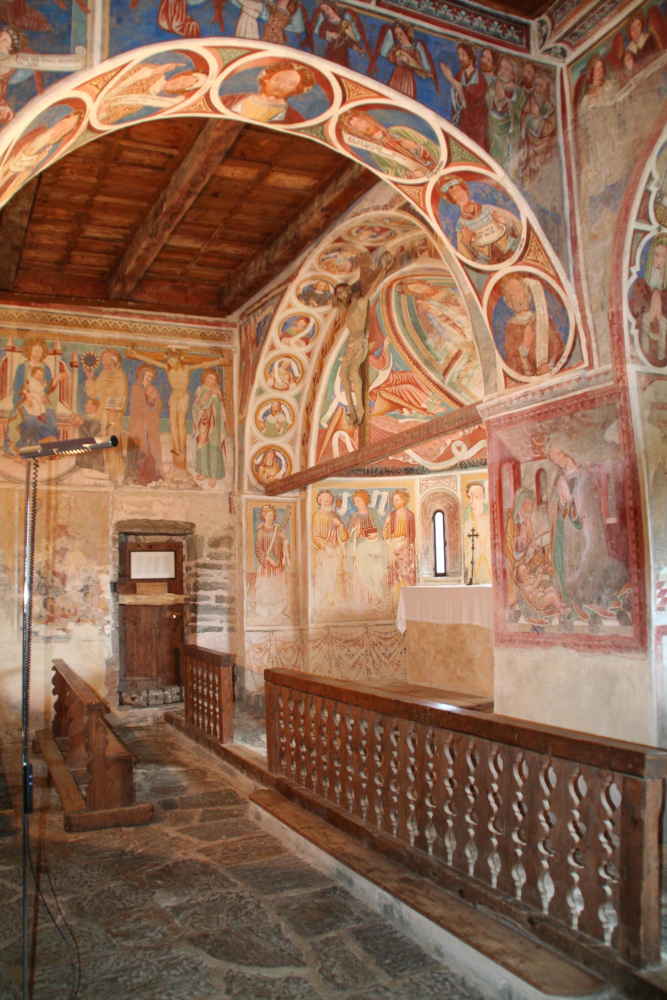 Blick in die NO-Ecke